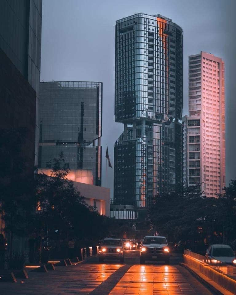 The Landmark Centro comercial y financiero Guadalajara, Jalisco.